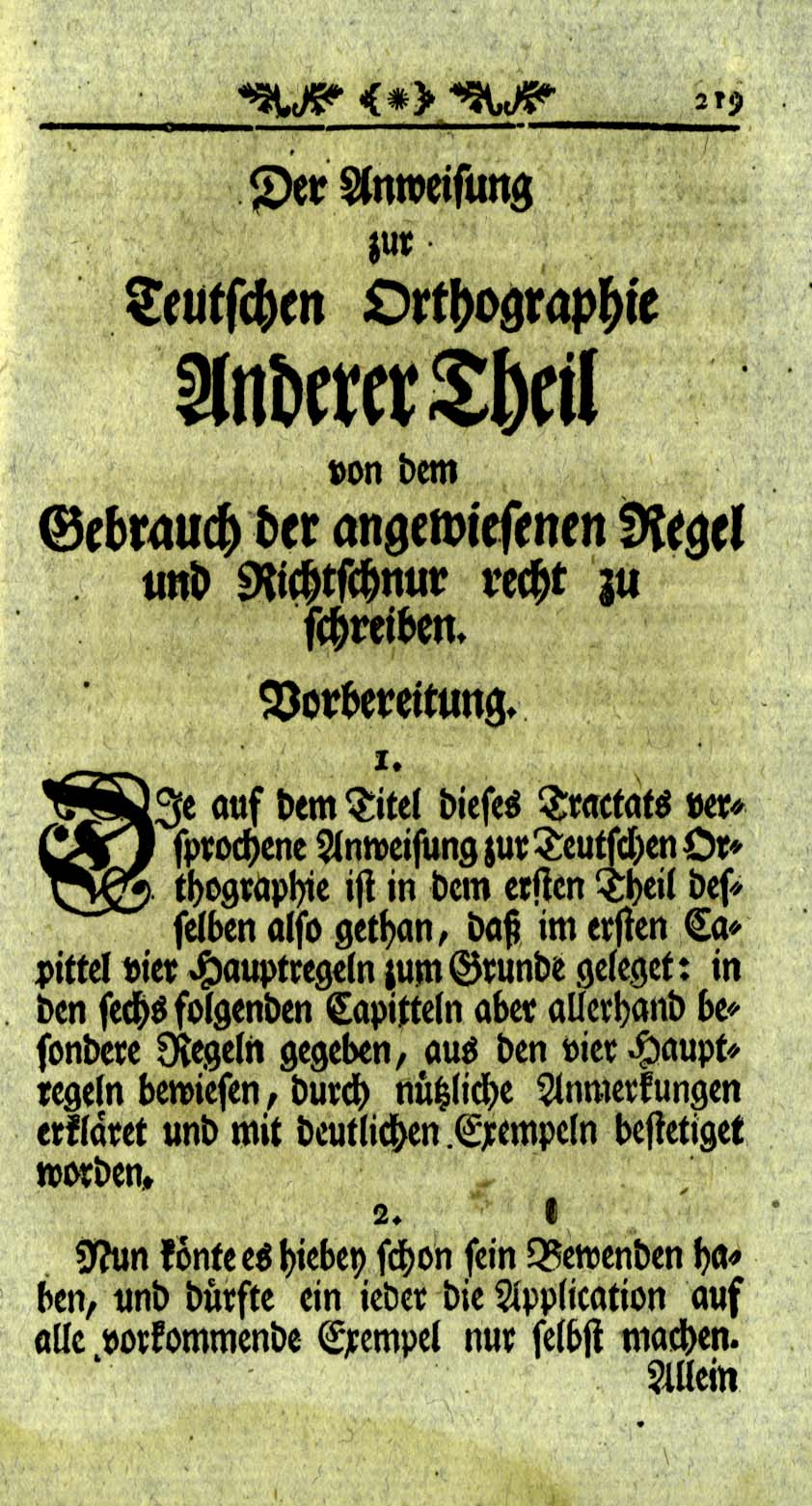 Hieronymus Freyer: Anweisung zur Teutschen Orthographie. Halle 1746. Hauptteil Seite 219